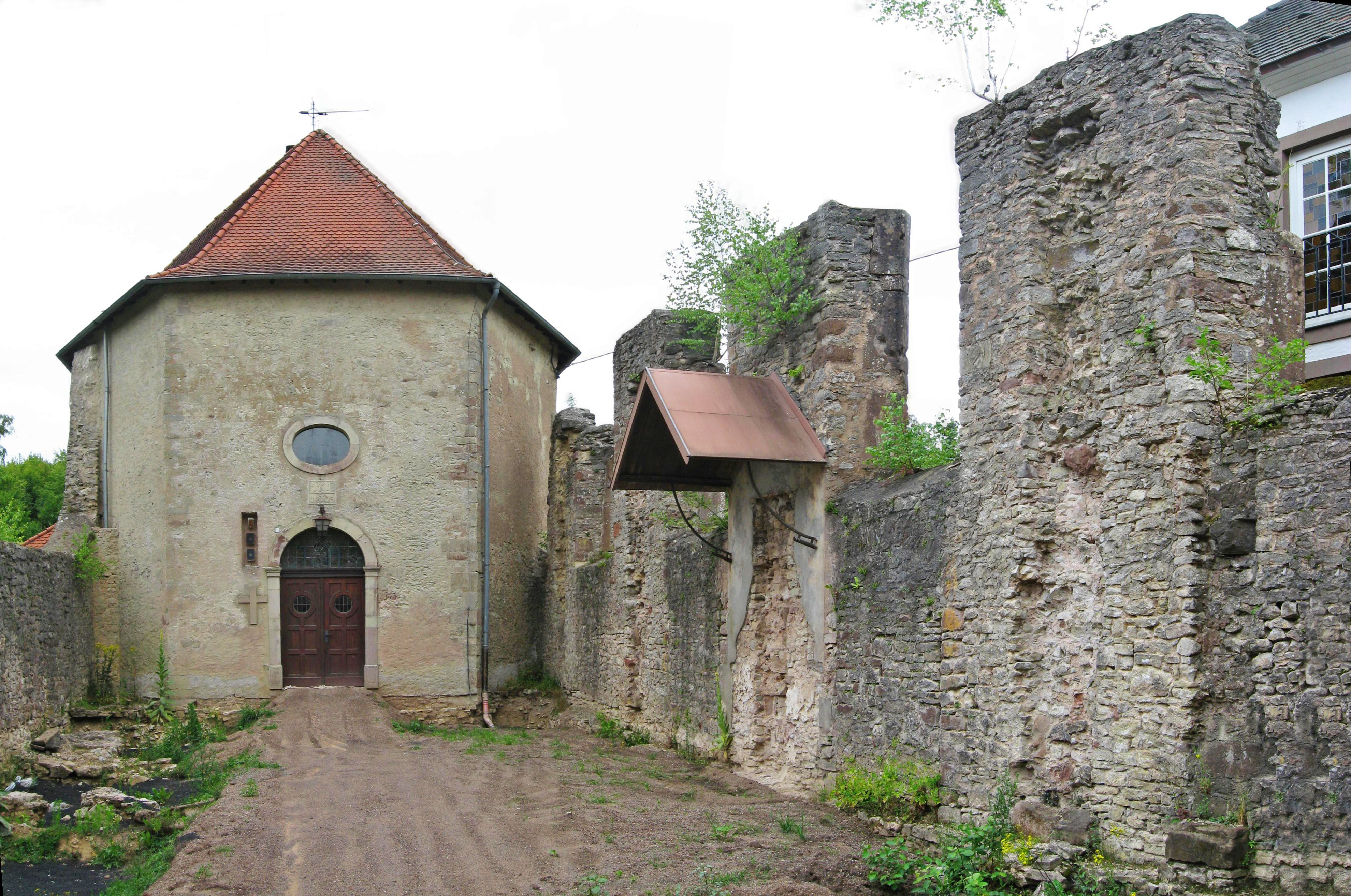 Blick über die Ruine